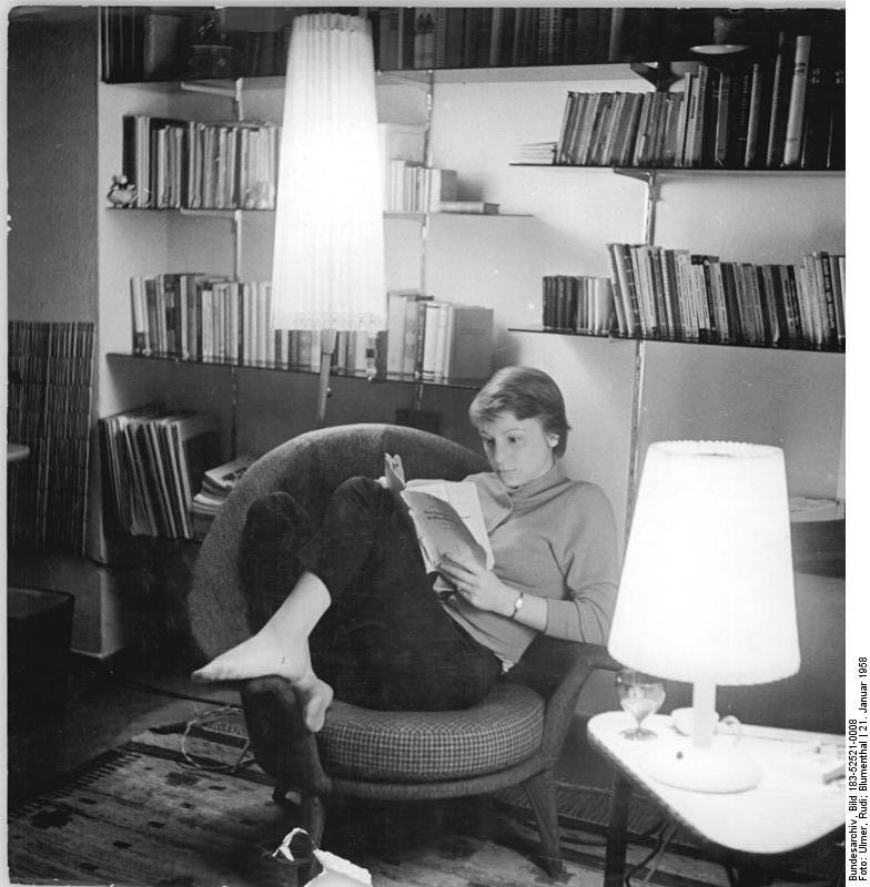 Wohnzimmer, Ursula Am-Ende Zentralbild Ulmer-Blumenthal 21.1.1958 Kindertheater vorbildlich. Besondere Liebe und Sorgfalt wird in unserer Republik den Inszenierungen der Theateraufführungen für unsere Kinder gewidmet. Die Schauspieler des Ensembles am Theater der Freundschaft in Berlin sind nicht nur bestrebt, durch intensives Studium ihrer Rollen und unermüdliches Proben mit ihren Leistungen den Erwartungen ihrer kleinen, sehr kritischen Zuschauer gerecht zu werden, sondern ein großer Teil ihrer Freizeit gehört dem Zusammensein mit Kindern. Sie wollen mit den Mentalitäten ihres Zuschauerkreises vertraut werden, da sich diese Kenntnis äusserst fruchtbar auf ihre künstlerische Arbeit auswirkt. UBz: Ursula Am-Ende in ihrem Heim in Berlin. Rollenstudium zu "Tom Sawyers großes Abenteuer".